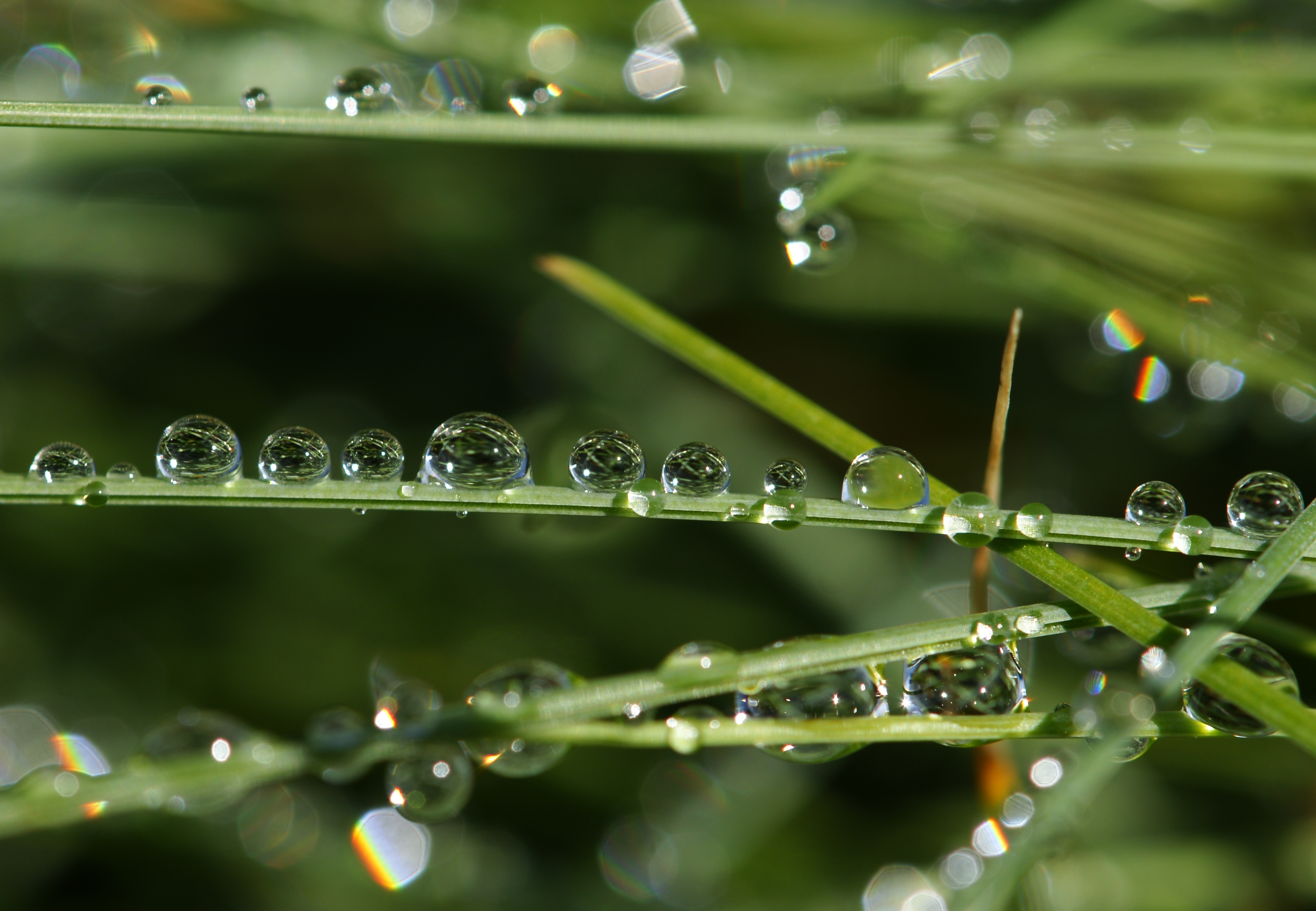 Tautropfen auf Gras.